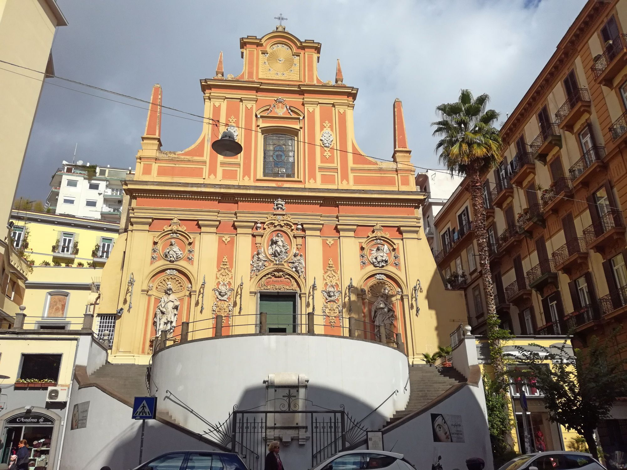 Santa Teresa a Chiaia (Facciata)